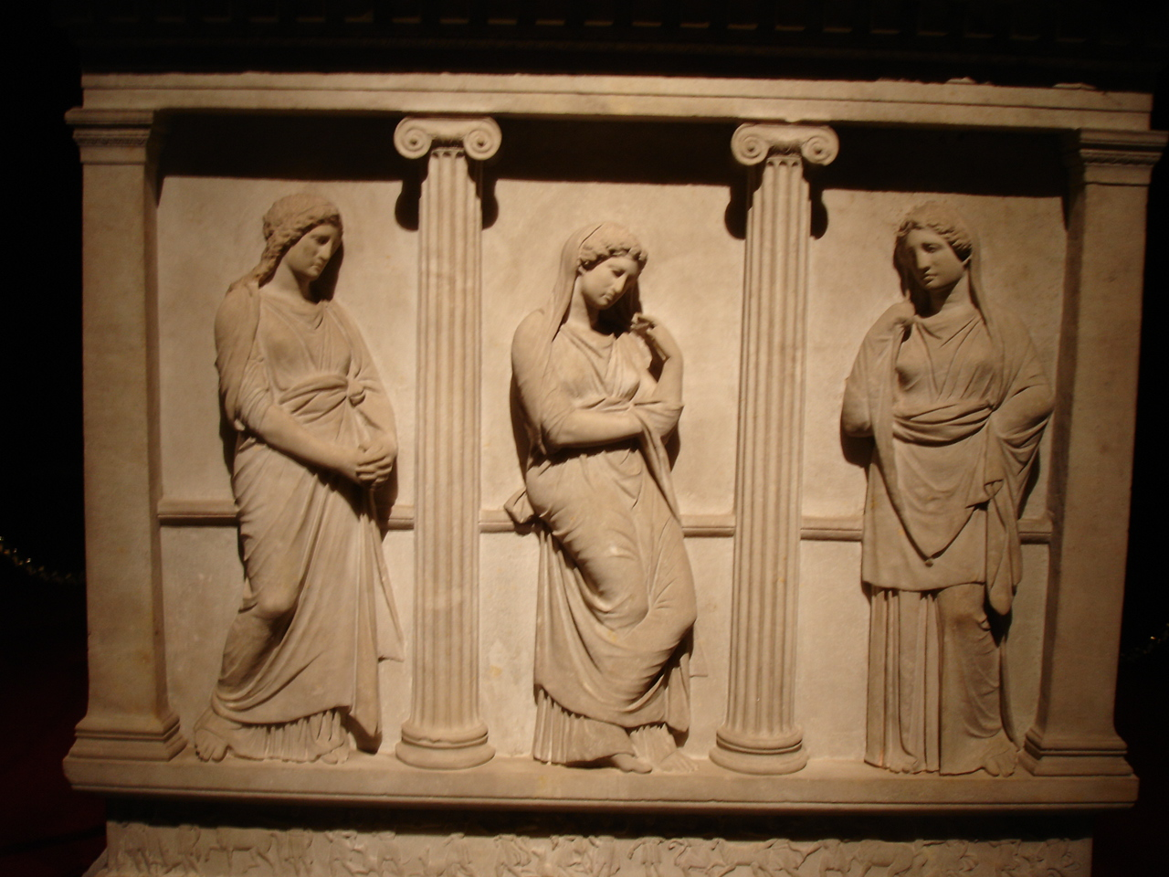 Istanbul - Museo archeologico - Sarcofago di un re ellenistico di Sidone, detto "Sarcofago delle piangenti", del 350 a.C. circa. - Foto di: Giovanni Dall'Orto 28-5-2006.